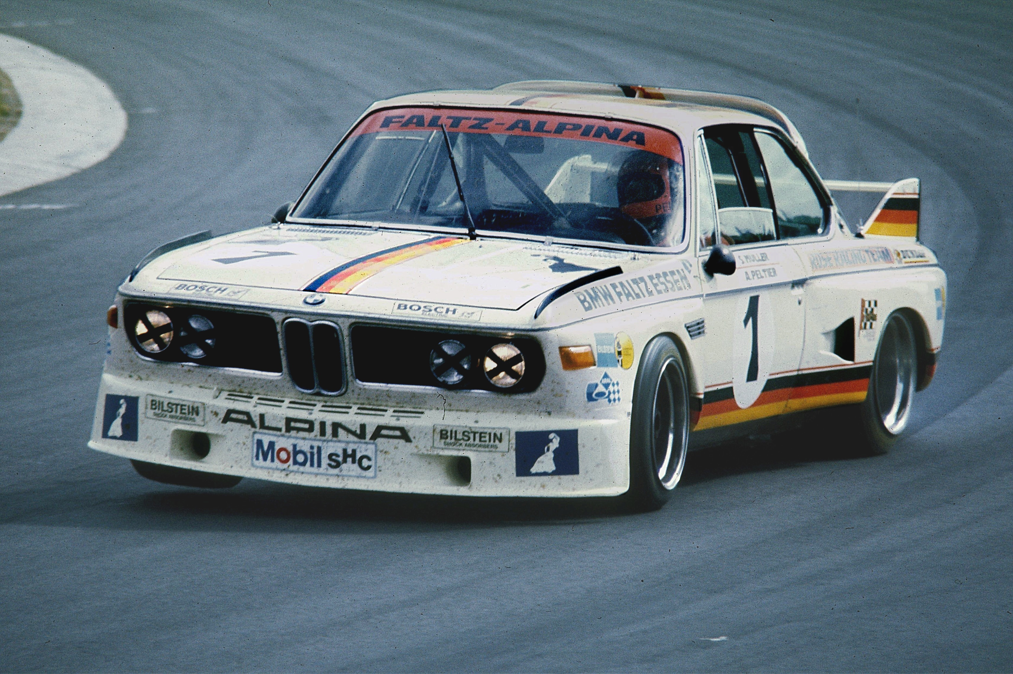 BMW CLS-1 beim 6-Stunden-Rennen auf dem Nürburgring 1975, Südkehre, gefahren von Alain Peltier)